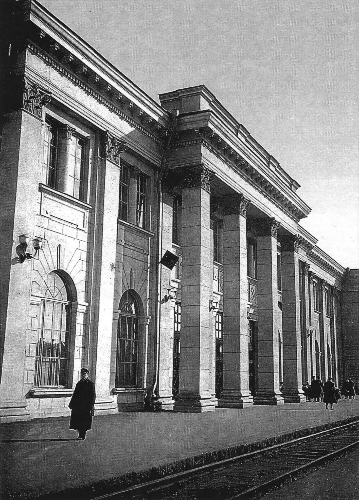 Беларуская (тарашкевіца): Менск (Miensk), вакзал Віленскі (Vilenski)